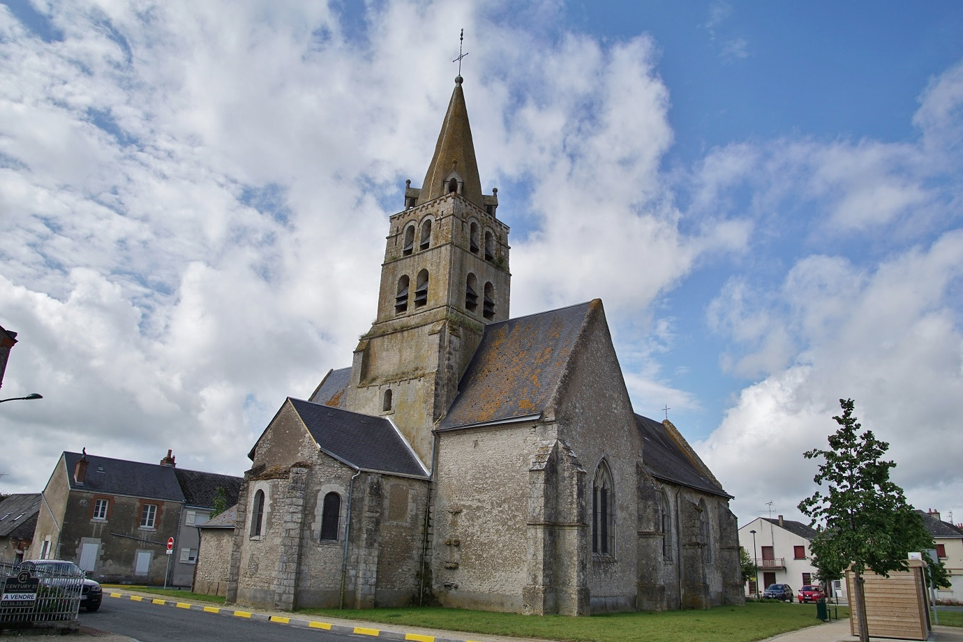 Loir et Cher